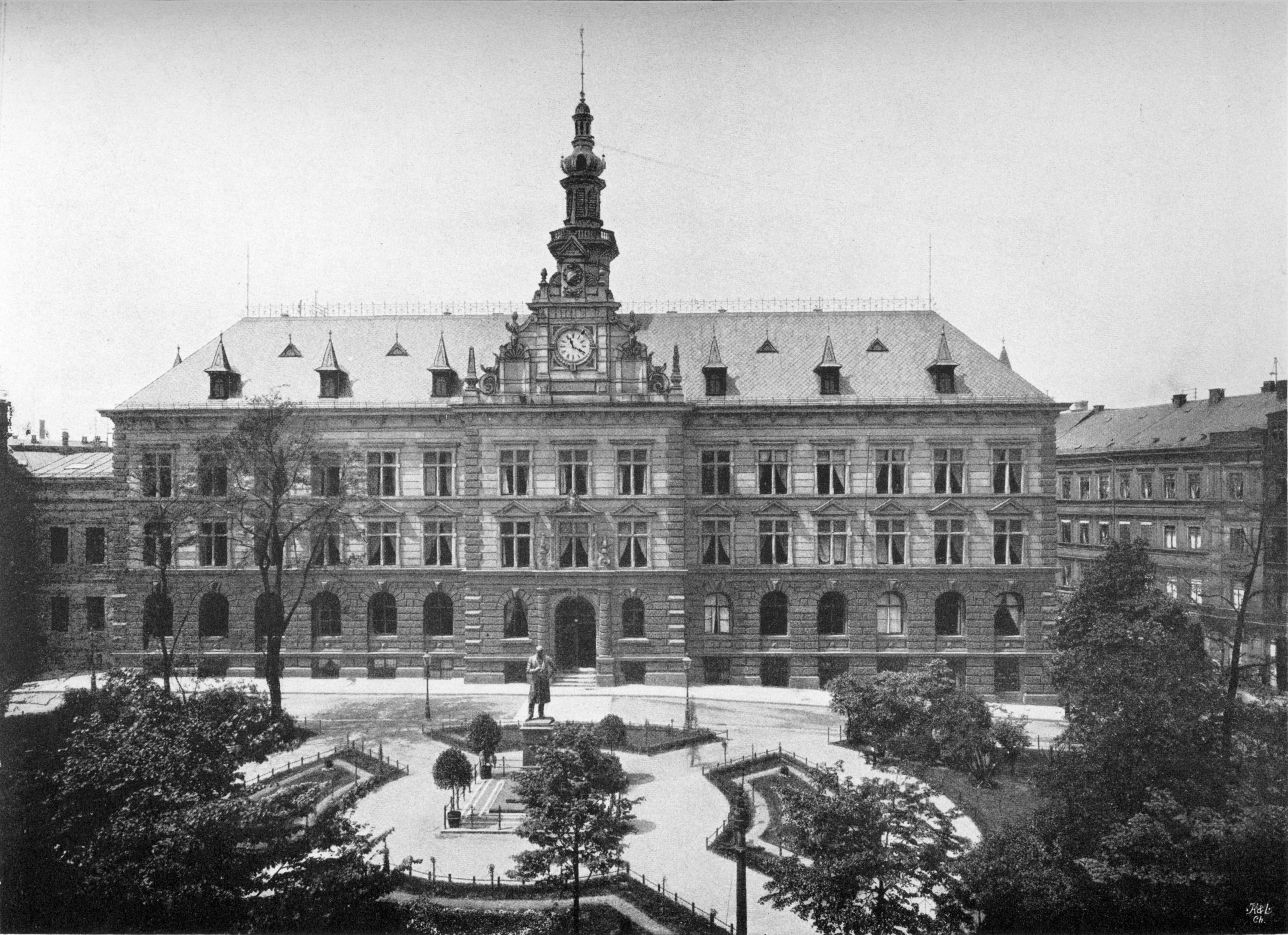 Beckerplatz mit Becker-Denkmal und Stadthaus (ehemals Neues Rathaus)